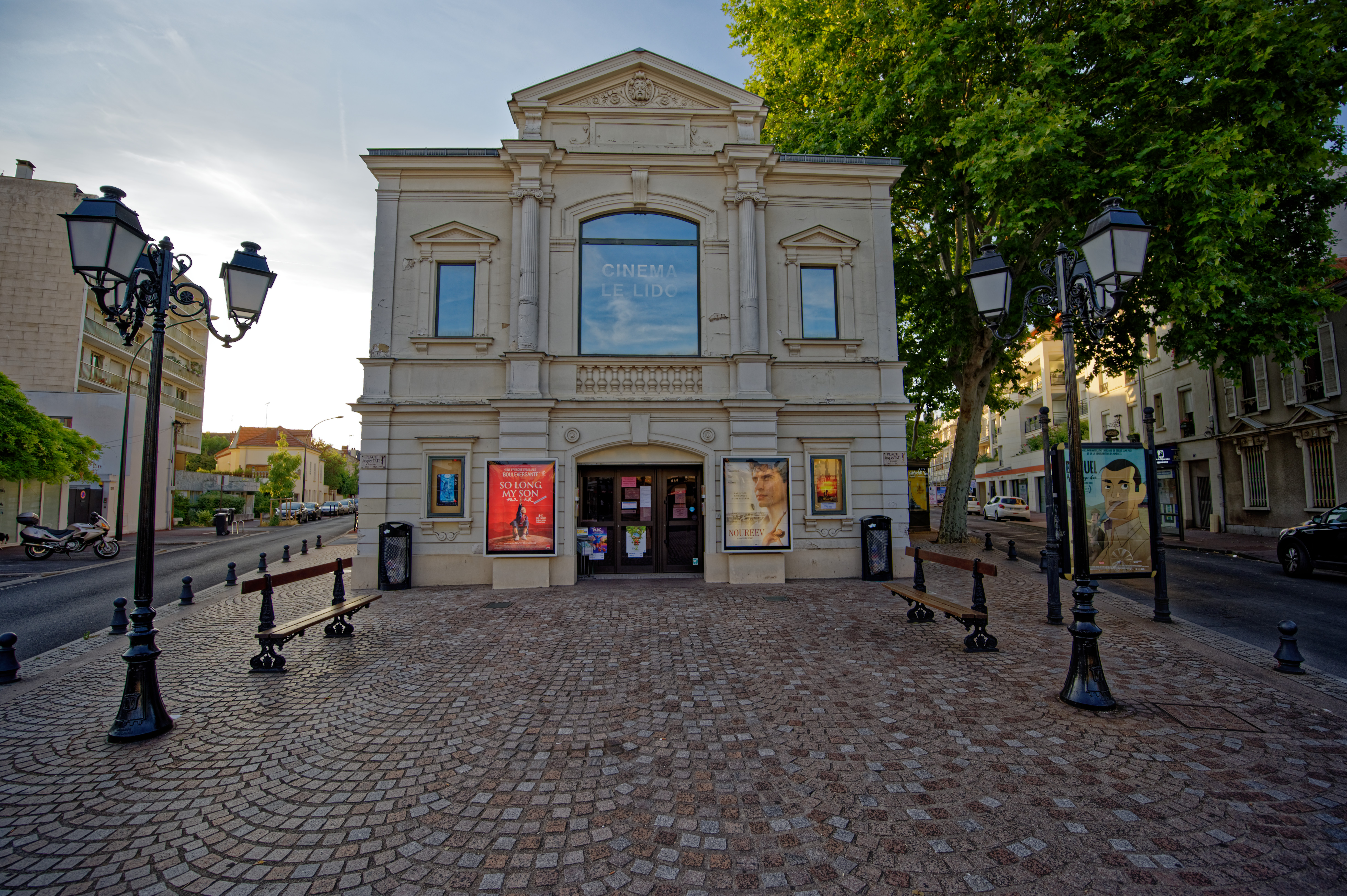 Façade du cinéma Le Lido à Saint-Maur des Fossés